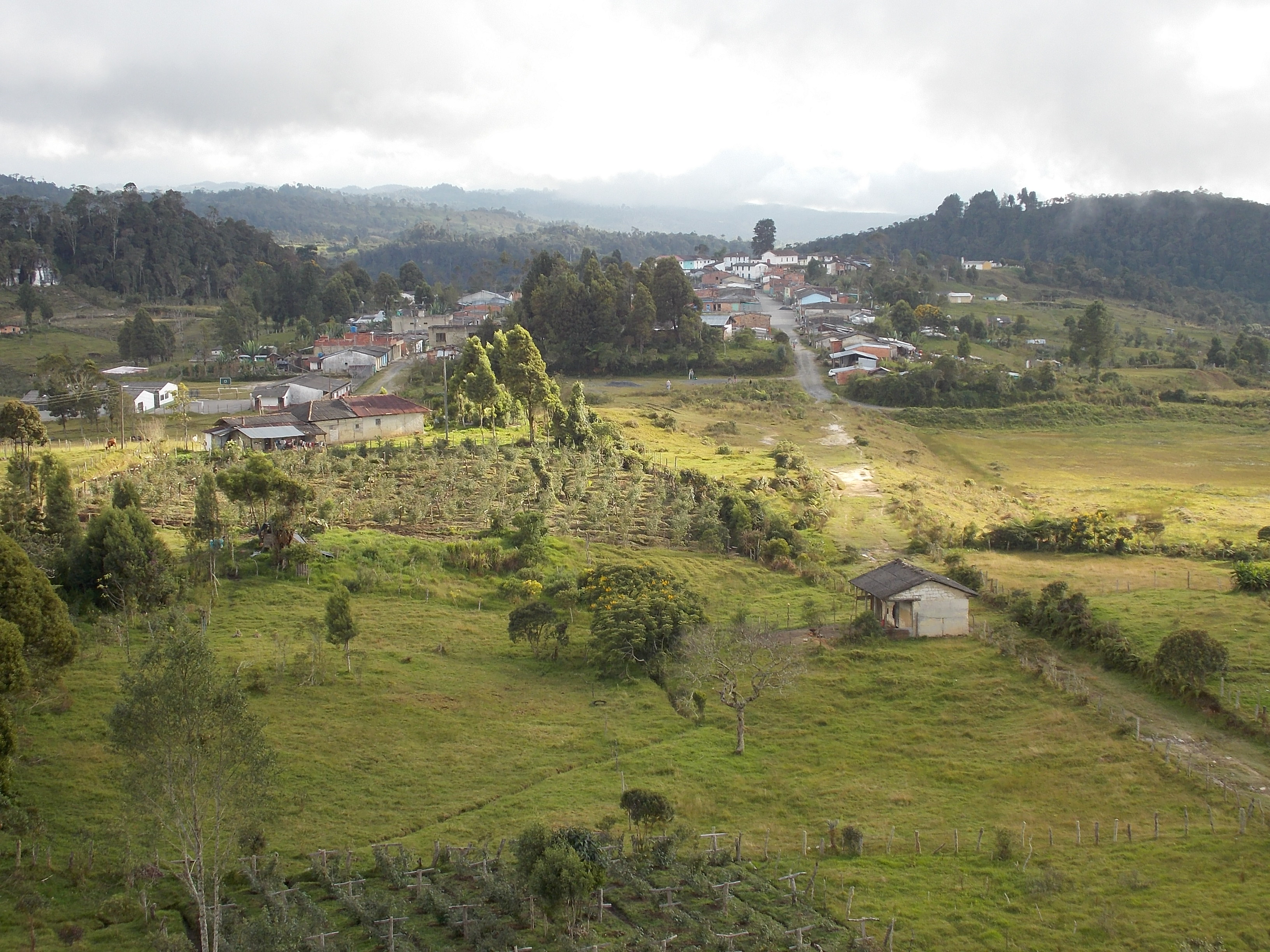 panoramica de mi Sabanagrande